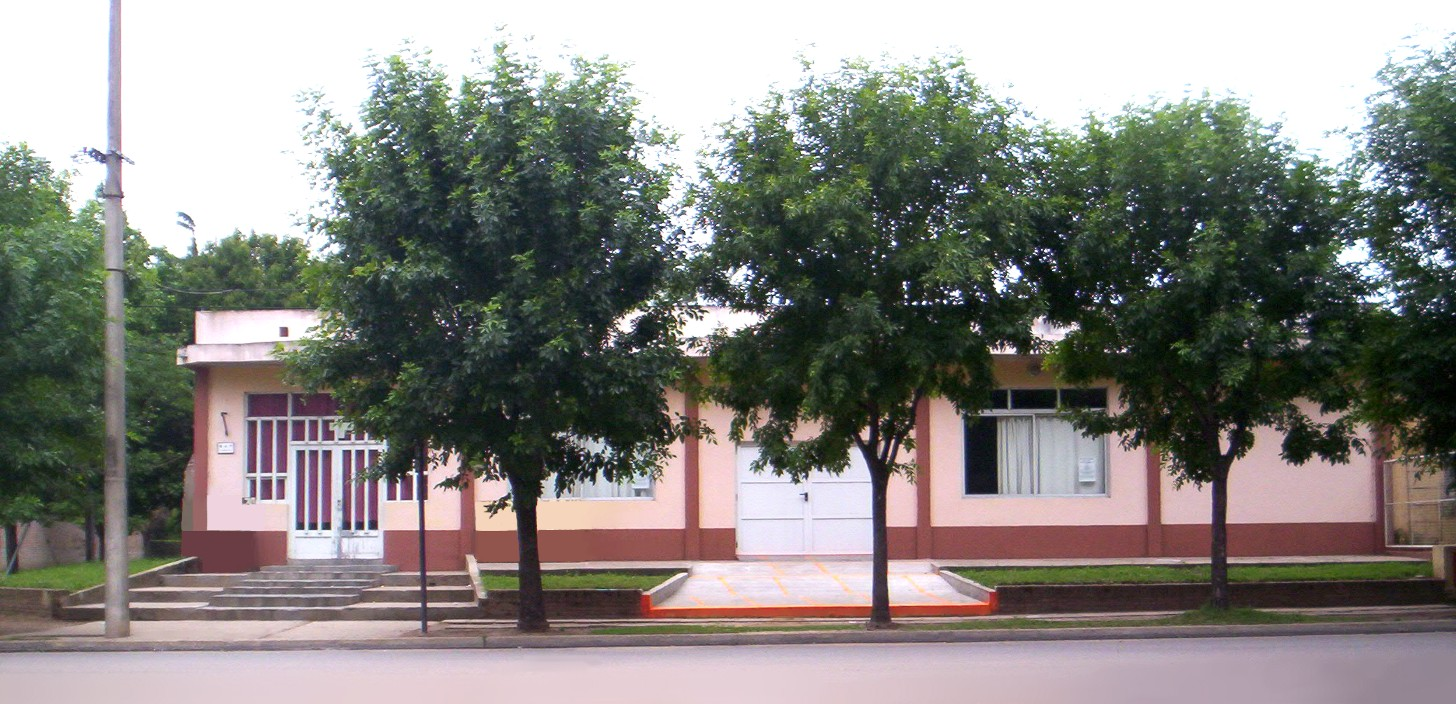 Sede del Club